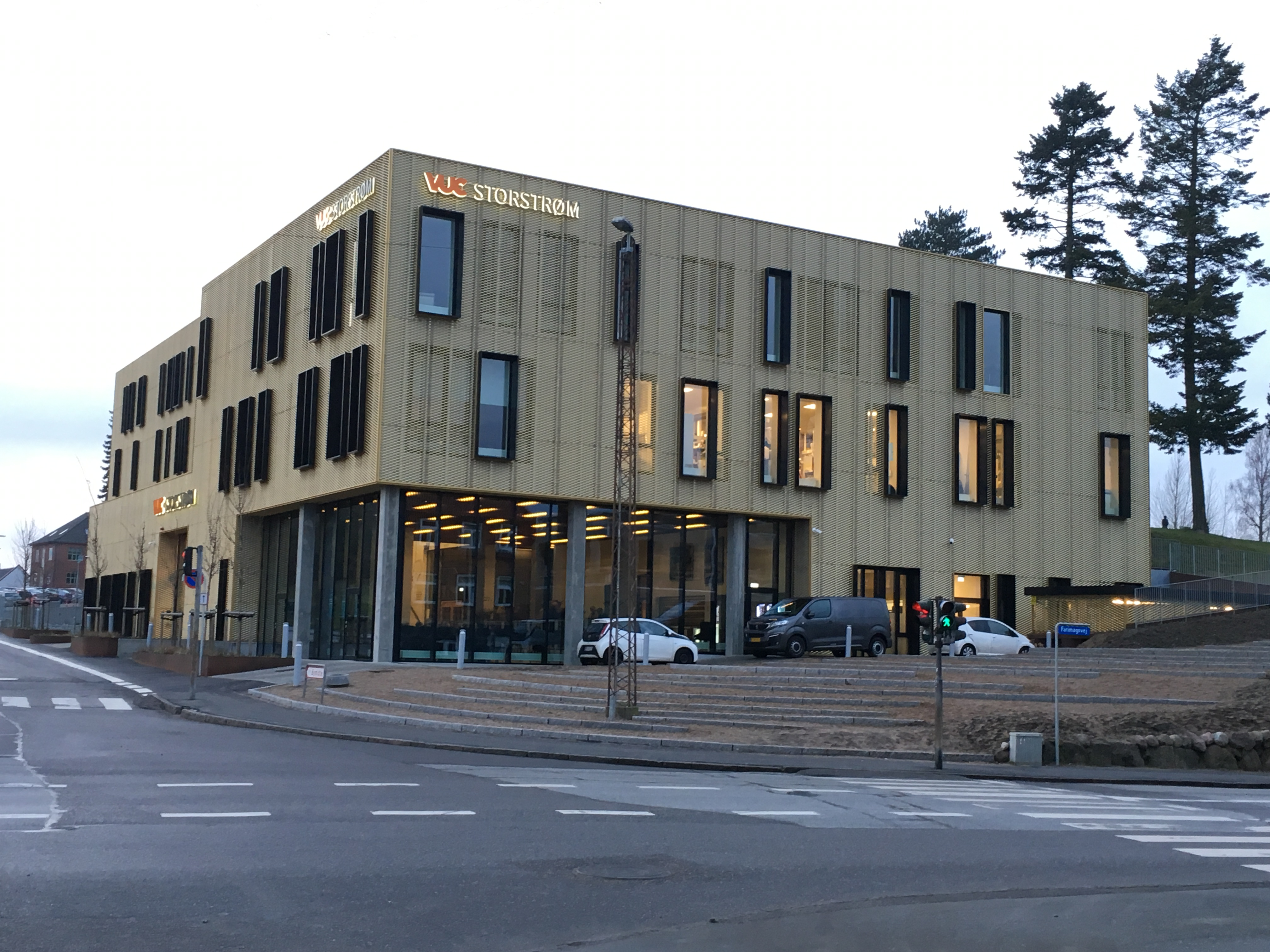 VUC Storstrøm Næstved eller "Guldhjørnet"